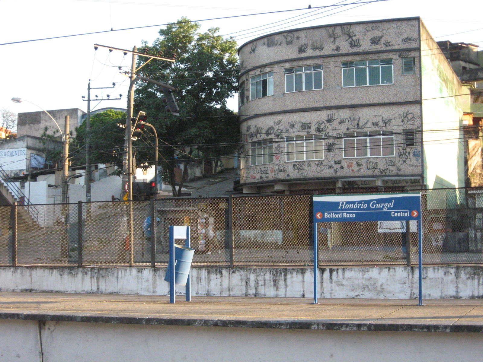 Vista da estação ferroviária no bairro de Honório Gurgel.